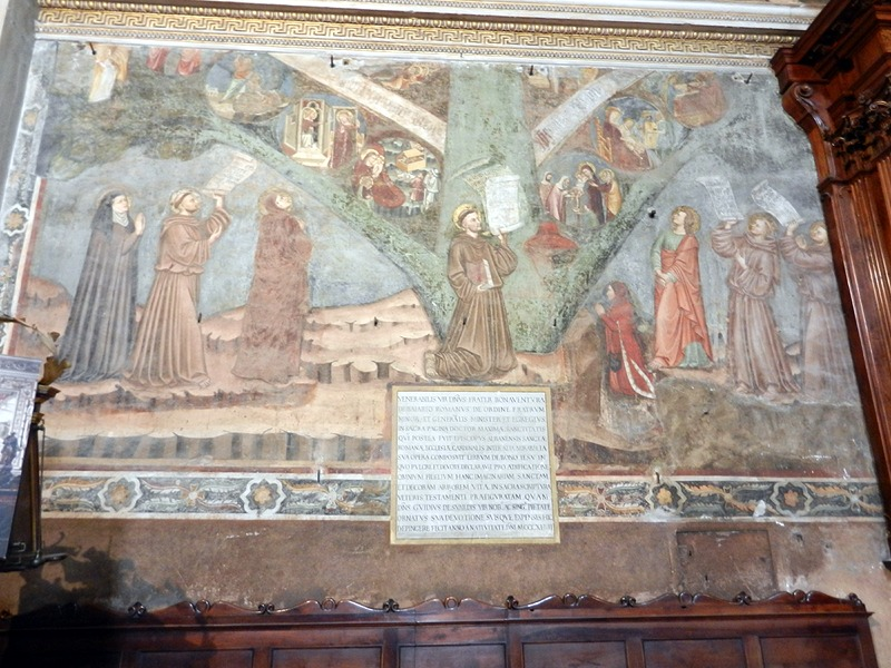 Bergamo - Affresco dell'Albero della Vita (secolo XIV) all'interno della Basilica di S. Maria Maggiore